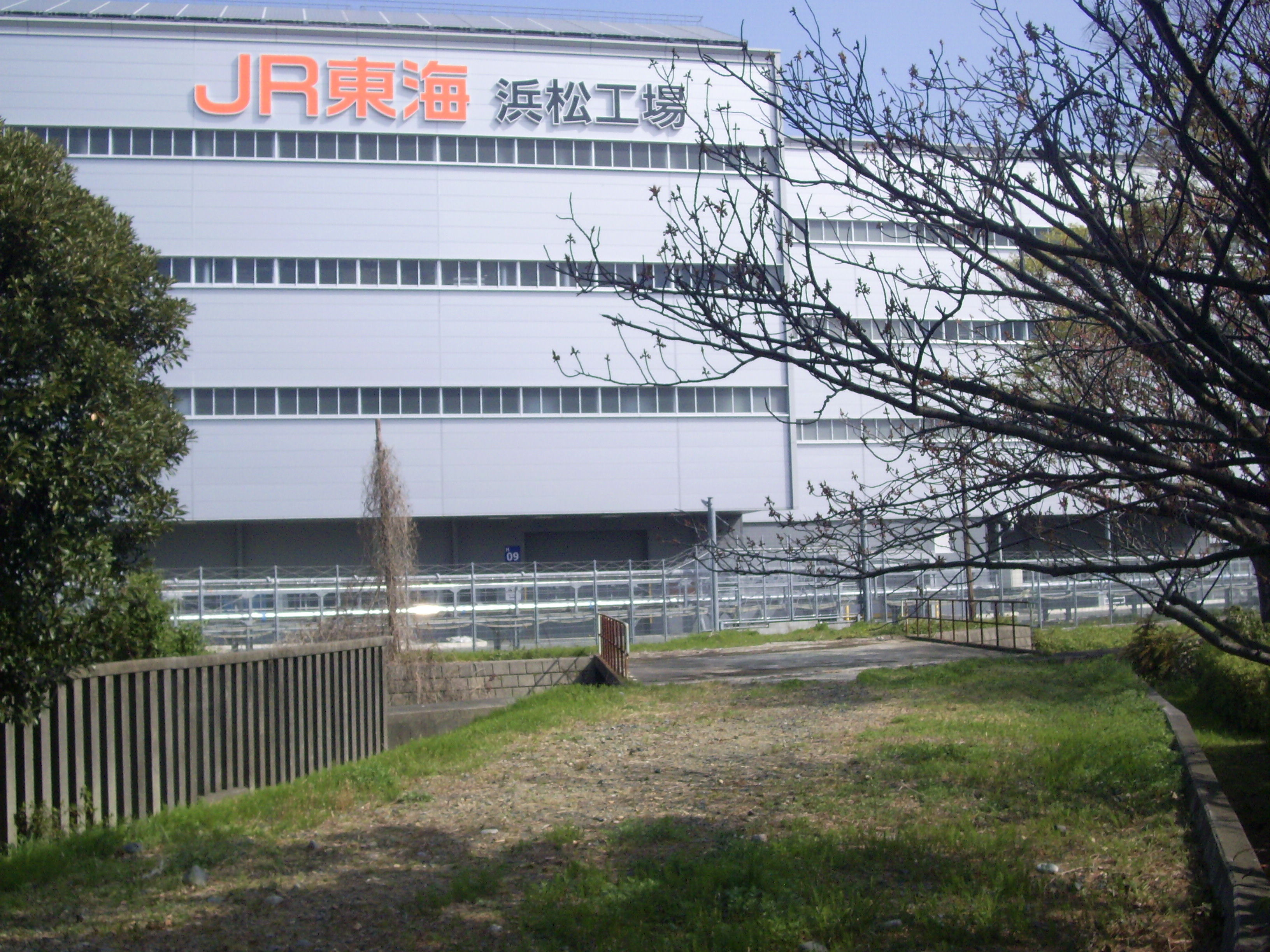 JR東海浜松工場を伊場遺跡の旧在来線用引き込み線跡から見る ㊟カメラを起動すると日付機能が出荷時のものに初期化されるため、ファイル履歴の投稿日時とメタデータの原画像データの生成日時が異なります（本概要欄の下記日付が撮影日）